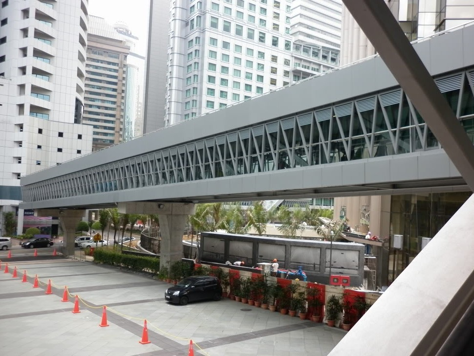 BBKLCC skybridge exterior